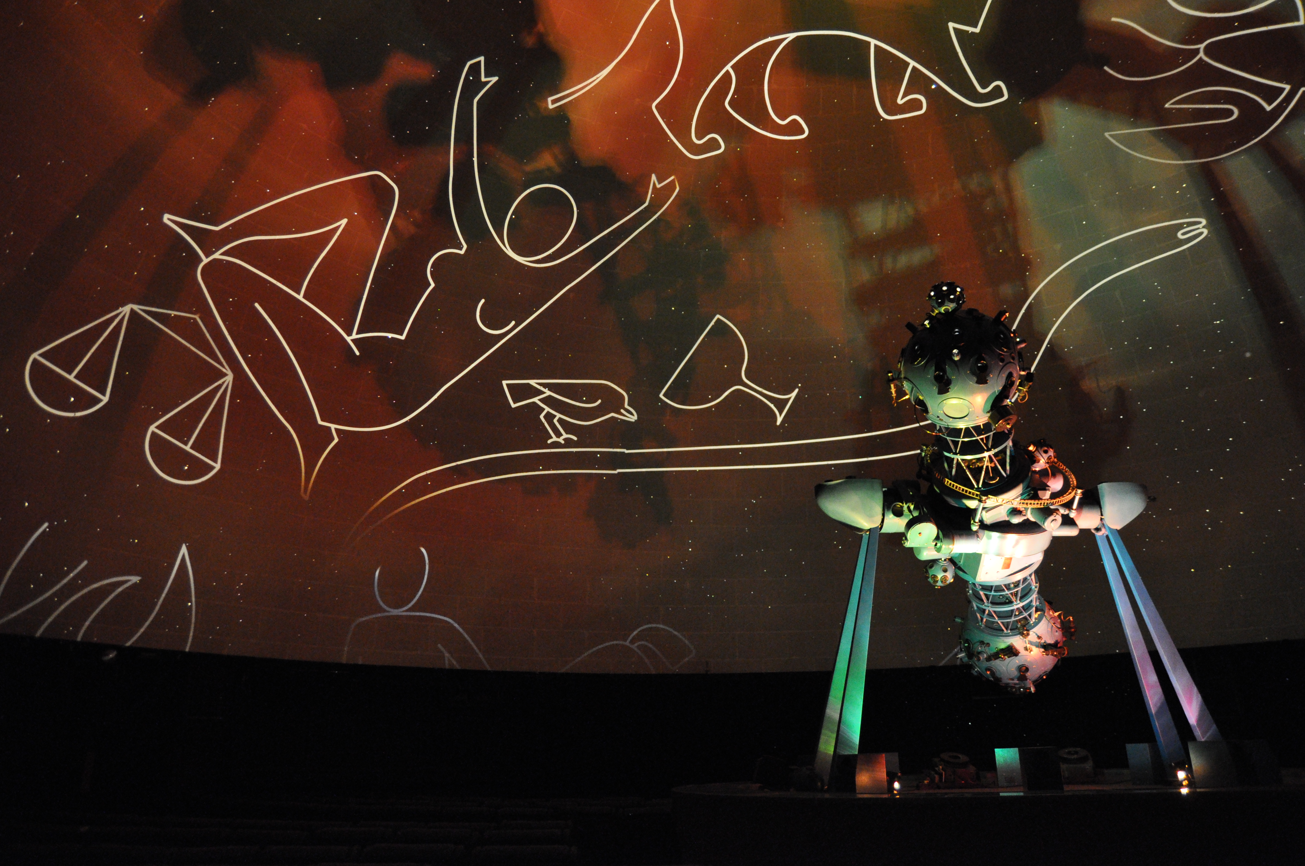 Budapest, Planetárium